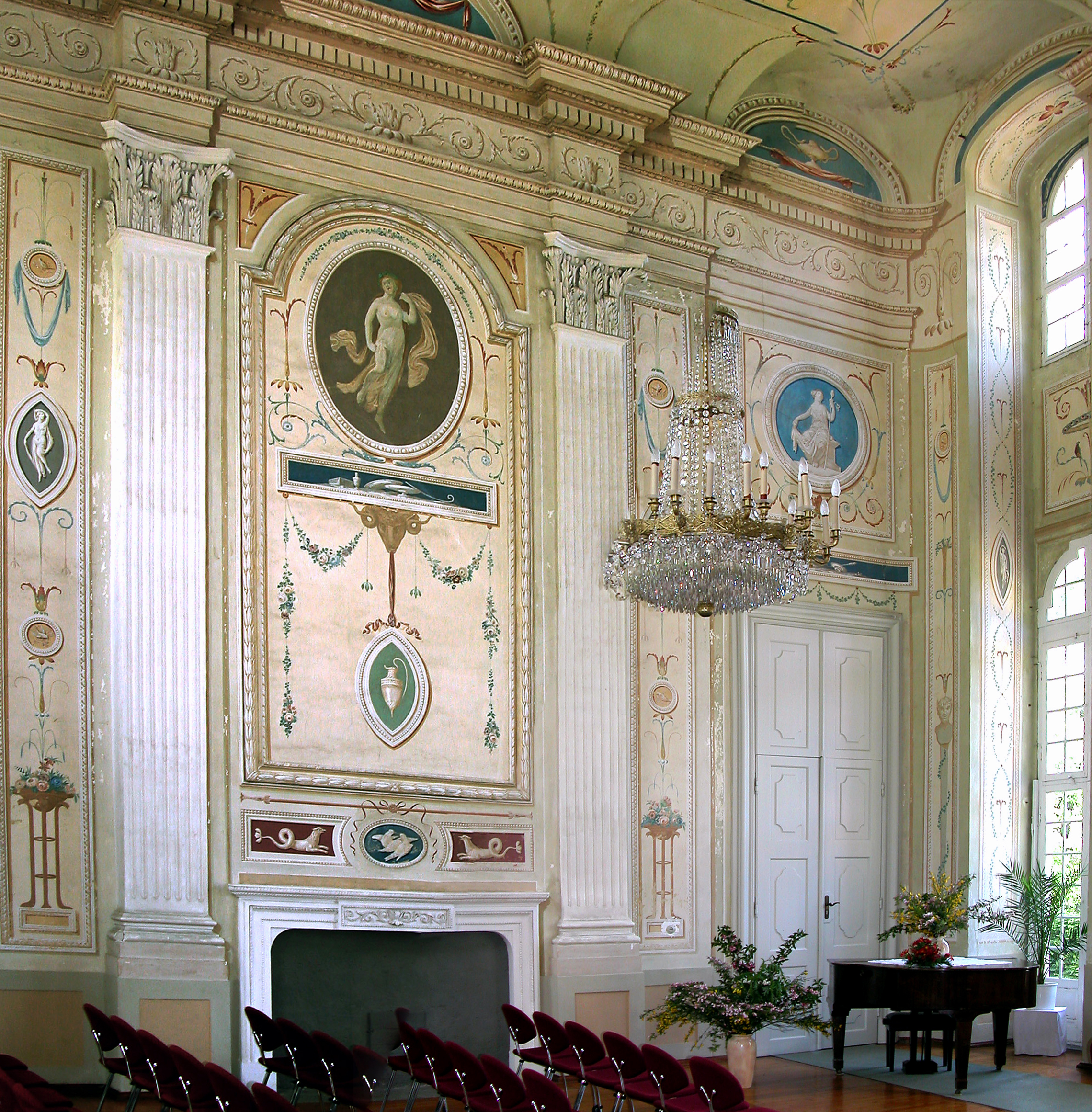 24.05.2003 02699 Neschwitz: Barockes Jagdschloß, 1730 anstelle einer alten Wasserburg errichtet. Saal im Erdgeschoß, Südwand. [DSCN]20030524560MDR.JPG(c)Blobelt